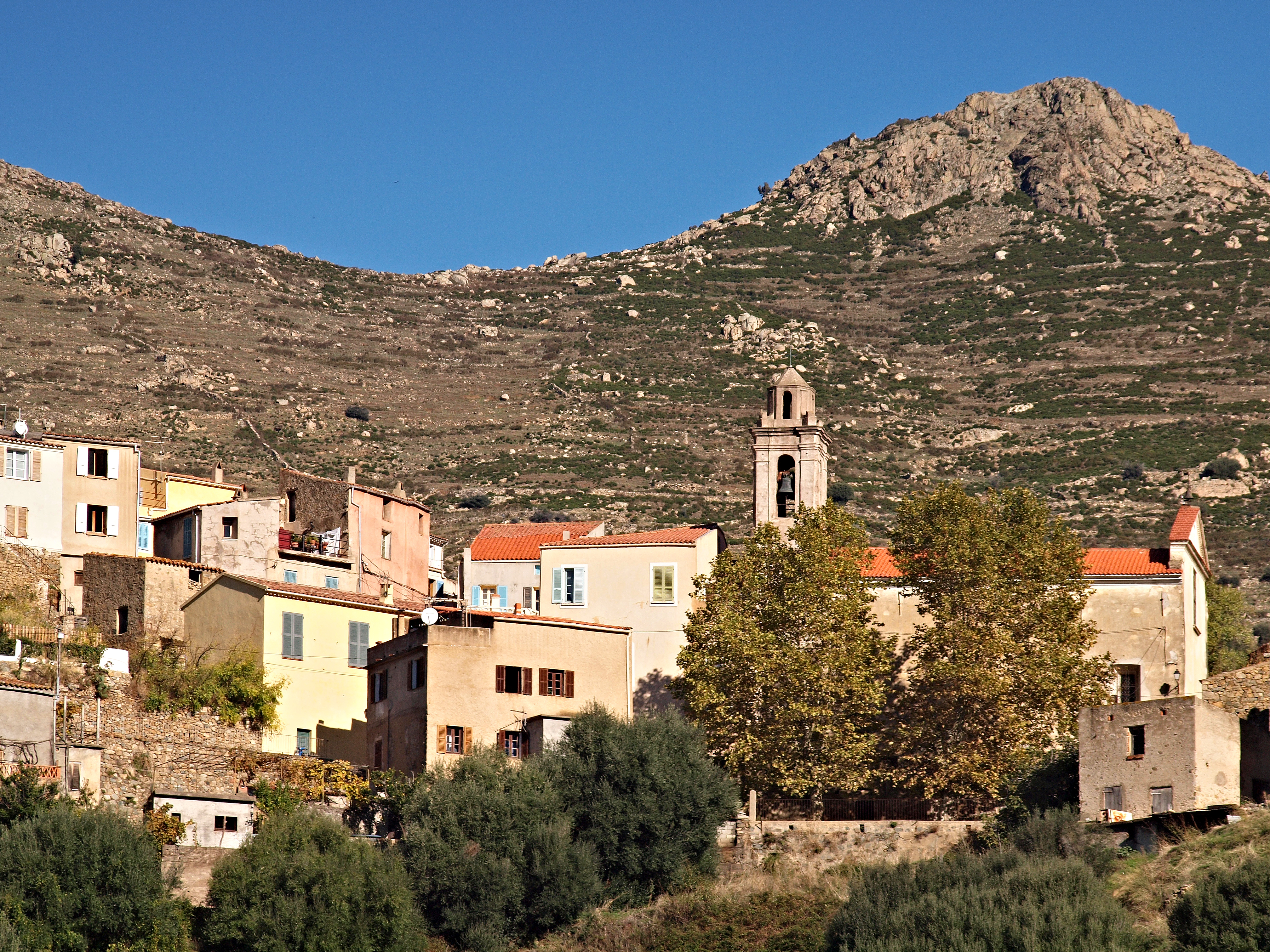 Montegrosso - Église St-Antoine Abbé (1651) à Cassano, Montegrosso (Corse)